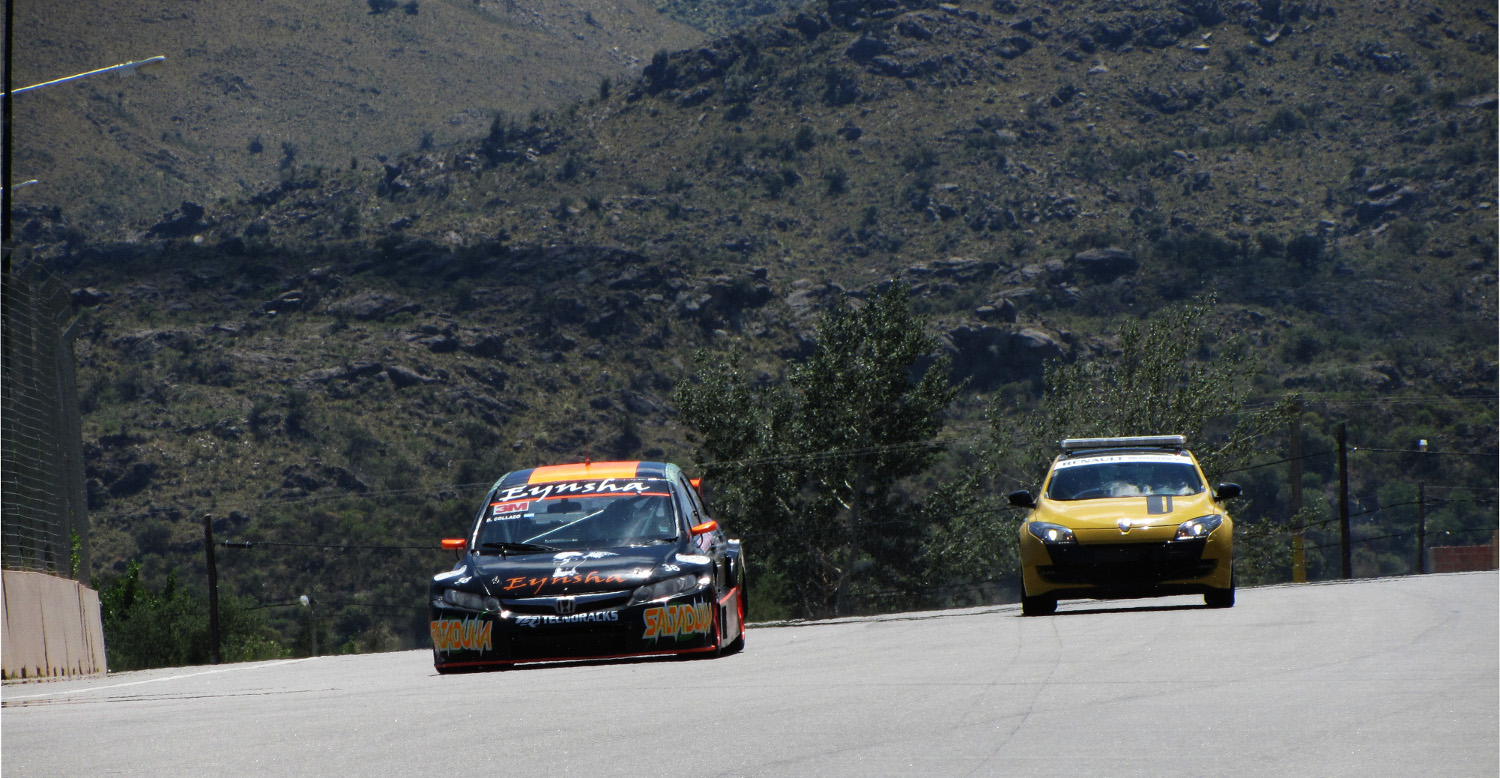 Foto tomada en el Circuito Internacional de Potrero de los Funes. Más información en